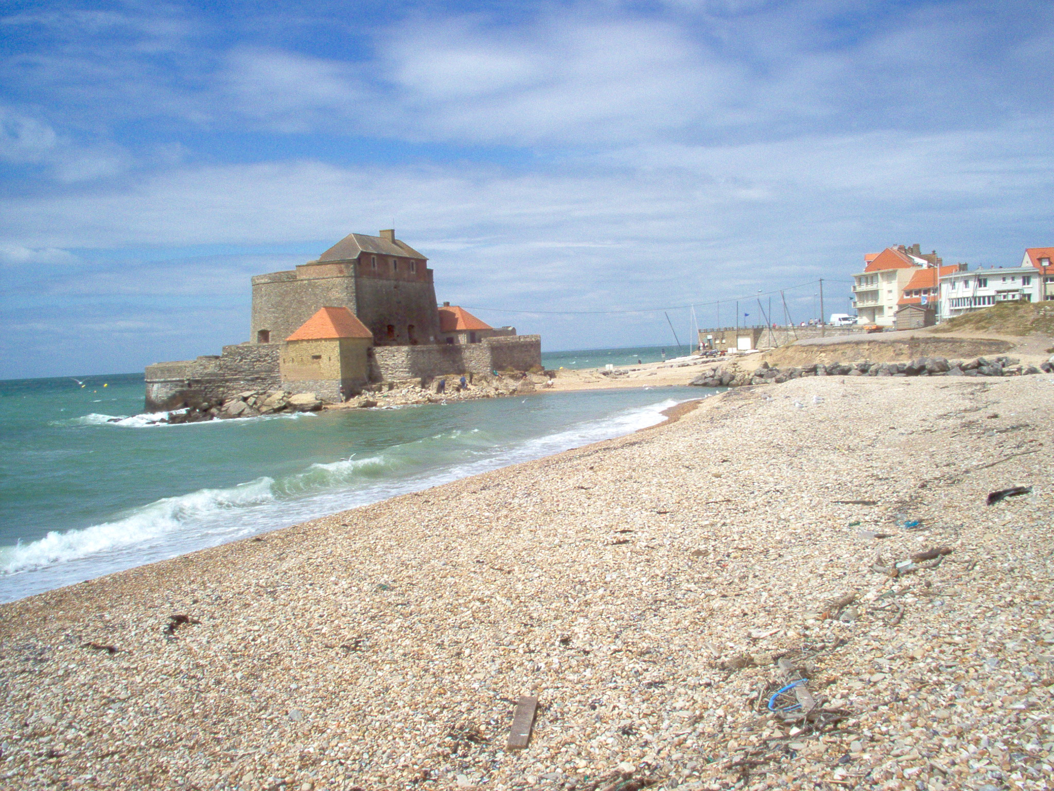 Fort Mahon, in Ambleteuse, Noord-Frankrijk